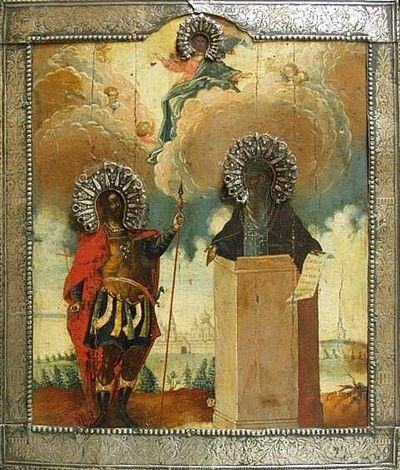 Икона "Святые Никита Стратилат и Никита столпник с видом Переславского Никитского монастыря". Русская икона конца XVIII века. Список храмовой иконы собора Никитского монастыря в Переславле Залесском